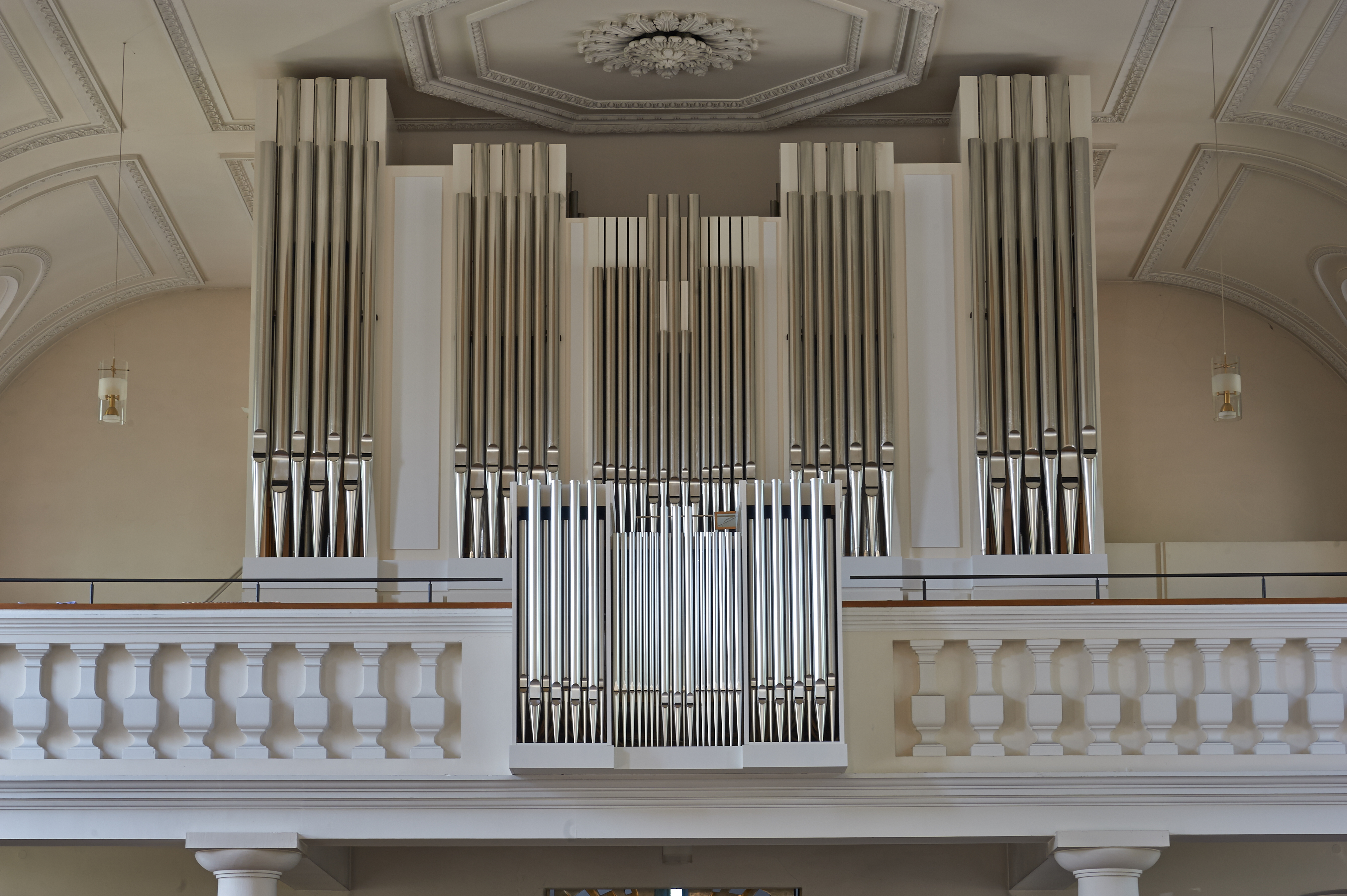 Blick auf die 2014 gebaute Maier-Orgel in der Pfarrkirche Mariä Heimsuchung Meersburg